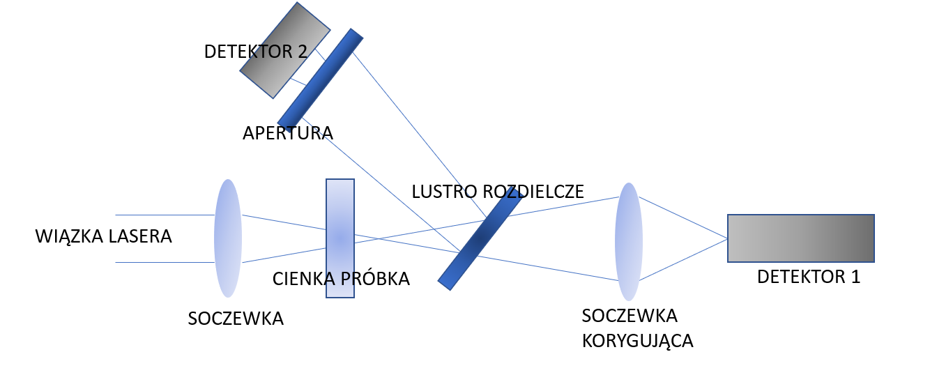 Schematyczna reprezetnacja układu optycznego do pomiarów nieliniowego współczynnika załamania światła i absorpcji dwufotonowej metodą z-skan